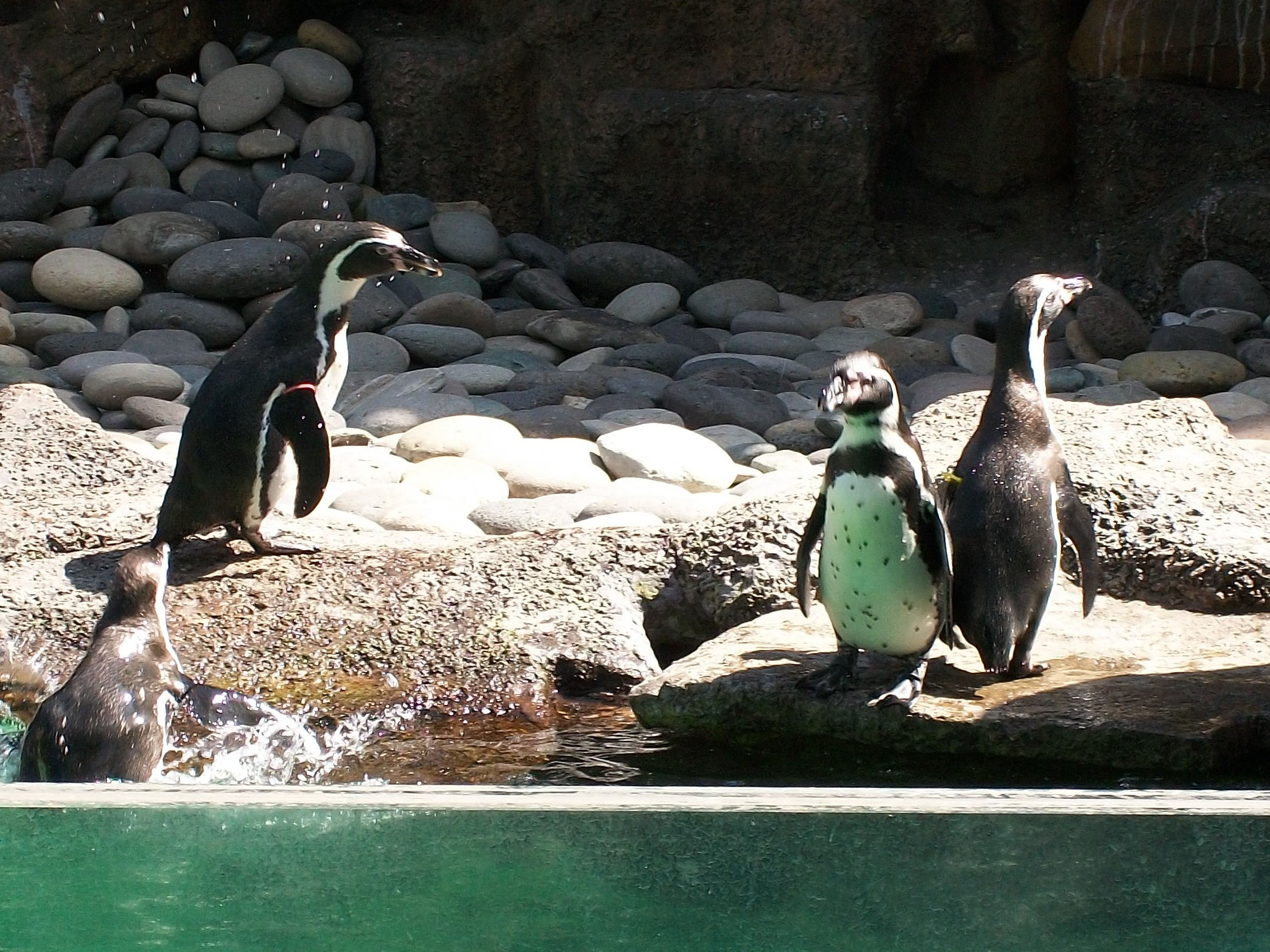 Pinguinos del Zoológico La Aurora.